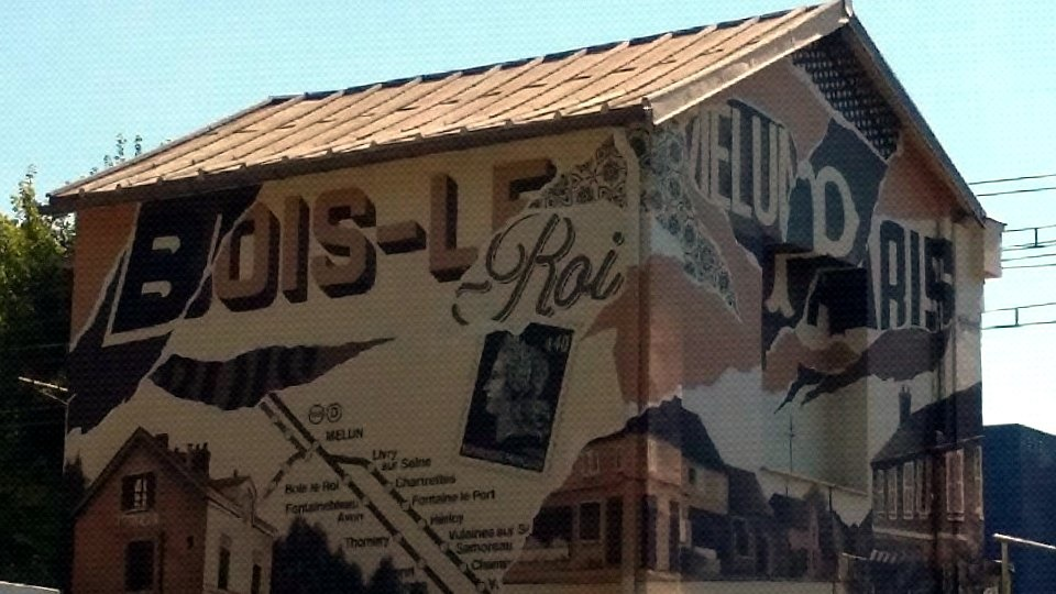 Abri voyageurs de la gare de Bois-le-Roi, Seine-et-Marne, France, avec ses fresques sépia.